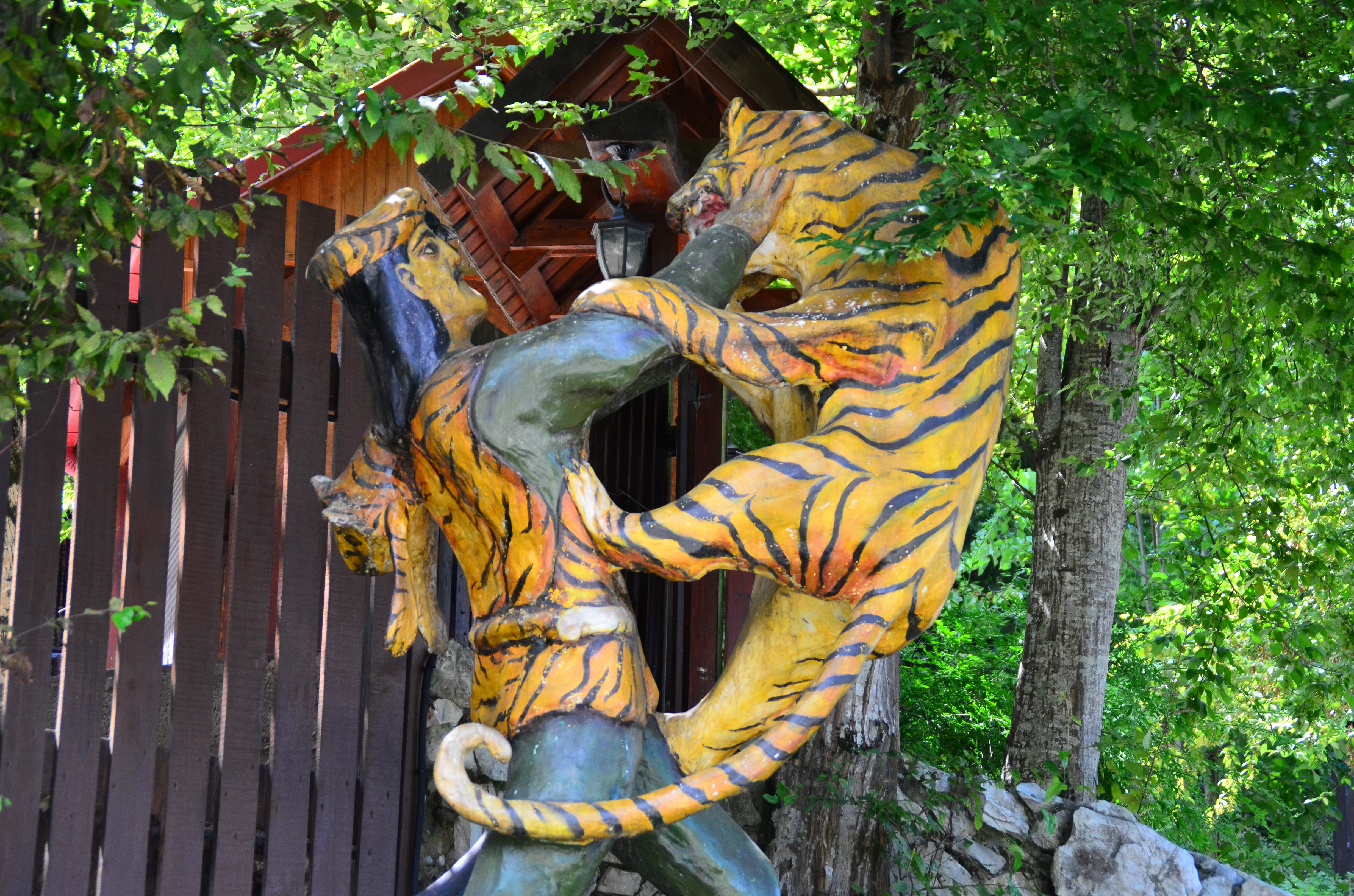 Akhun mountain, Sochi, Russia 43° 33′ 2″ N, 39° 50′ 36″ E